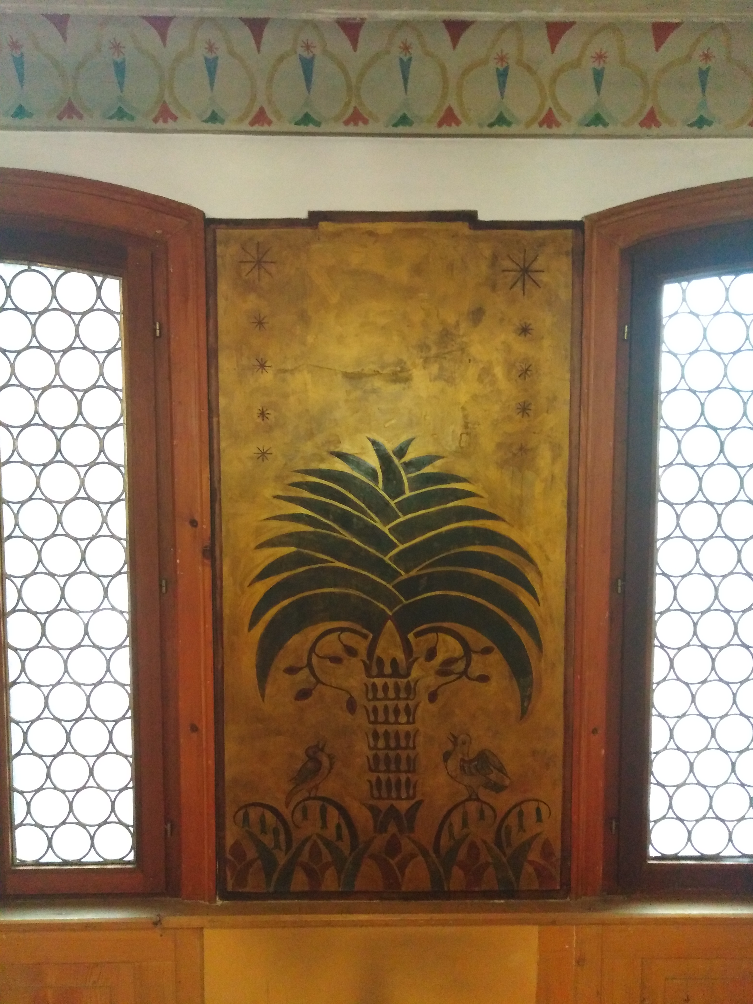 Palme des Gerechten in der Alten Synagoge Rottweil. Den unteren Bildrand zieren Pflanzenornamente; auf dem Blattstängel der Salomonssiegel jubilieren Vögel. Der obere Bildrand ist links und rechts mit Sternen gesäumt. (Ca. 1850)